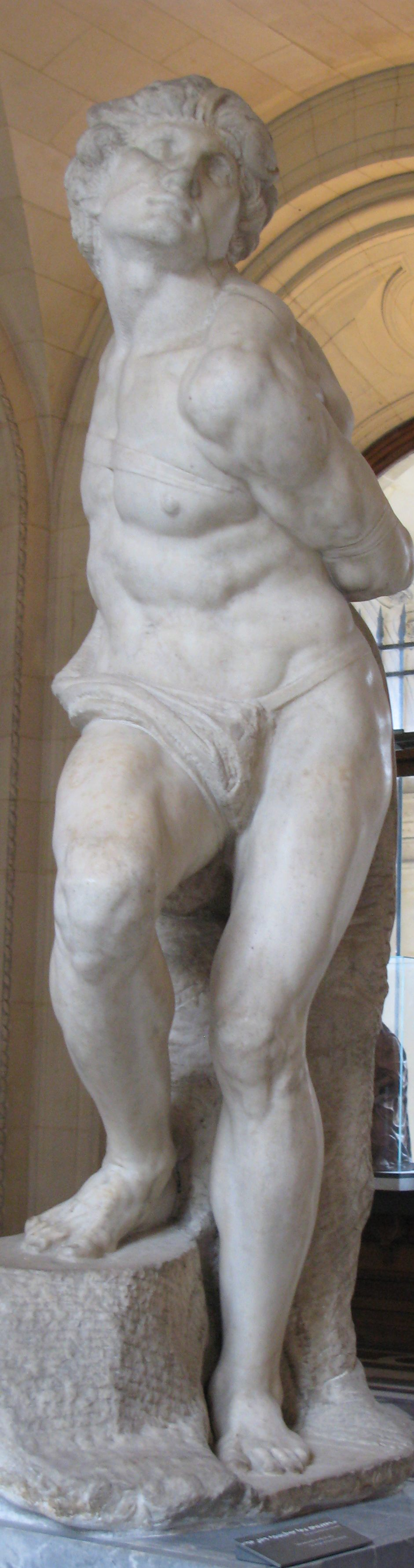 Rebellious Slave 1513-16, Marble, Height 215 cm (7 ft), Musée du Louvre, Paris